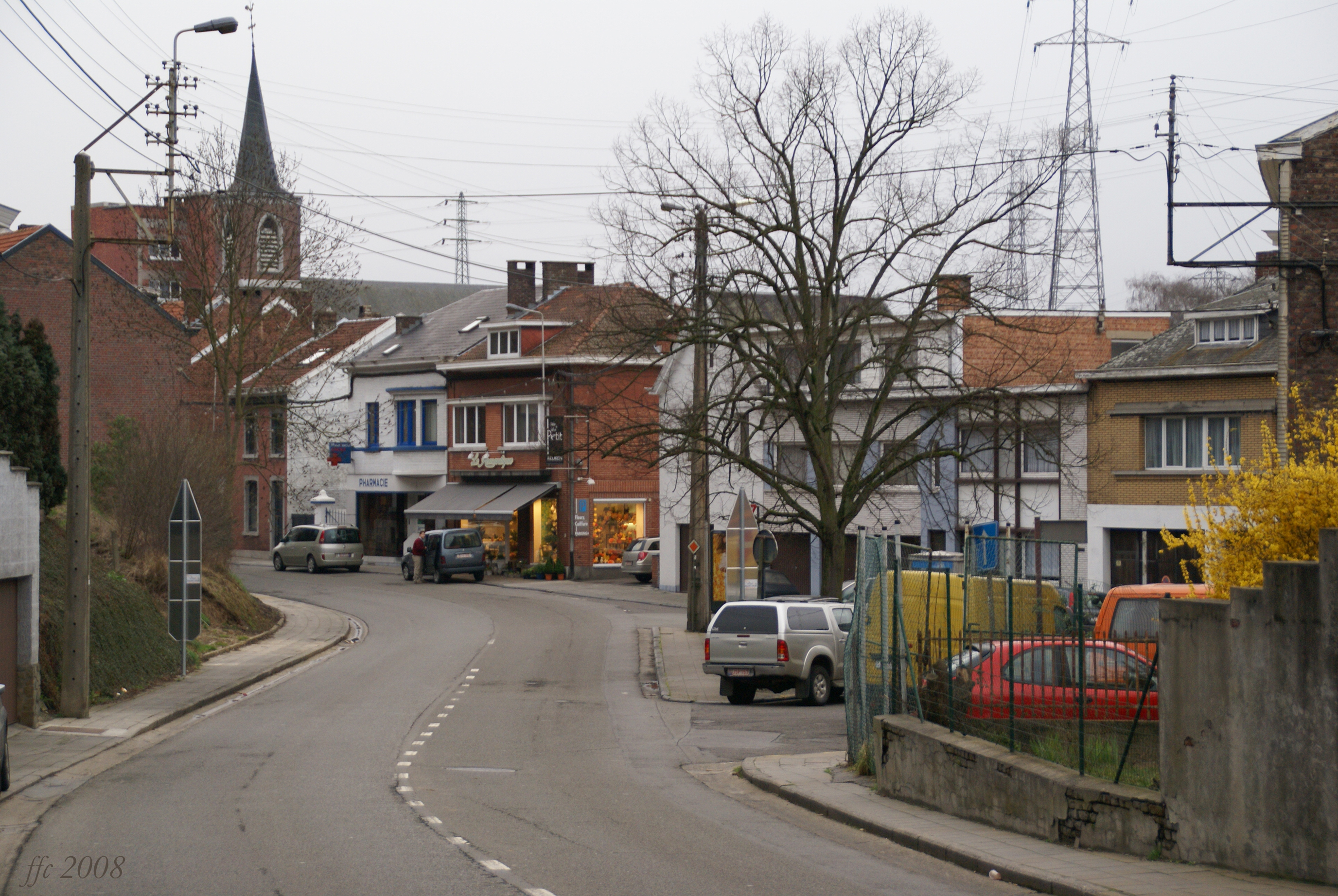 Ivoz-Ramet (Belgium) Chaussée de Ramioul High Street rue principale carrer major hoofdstraat